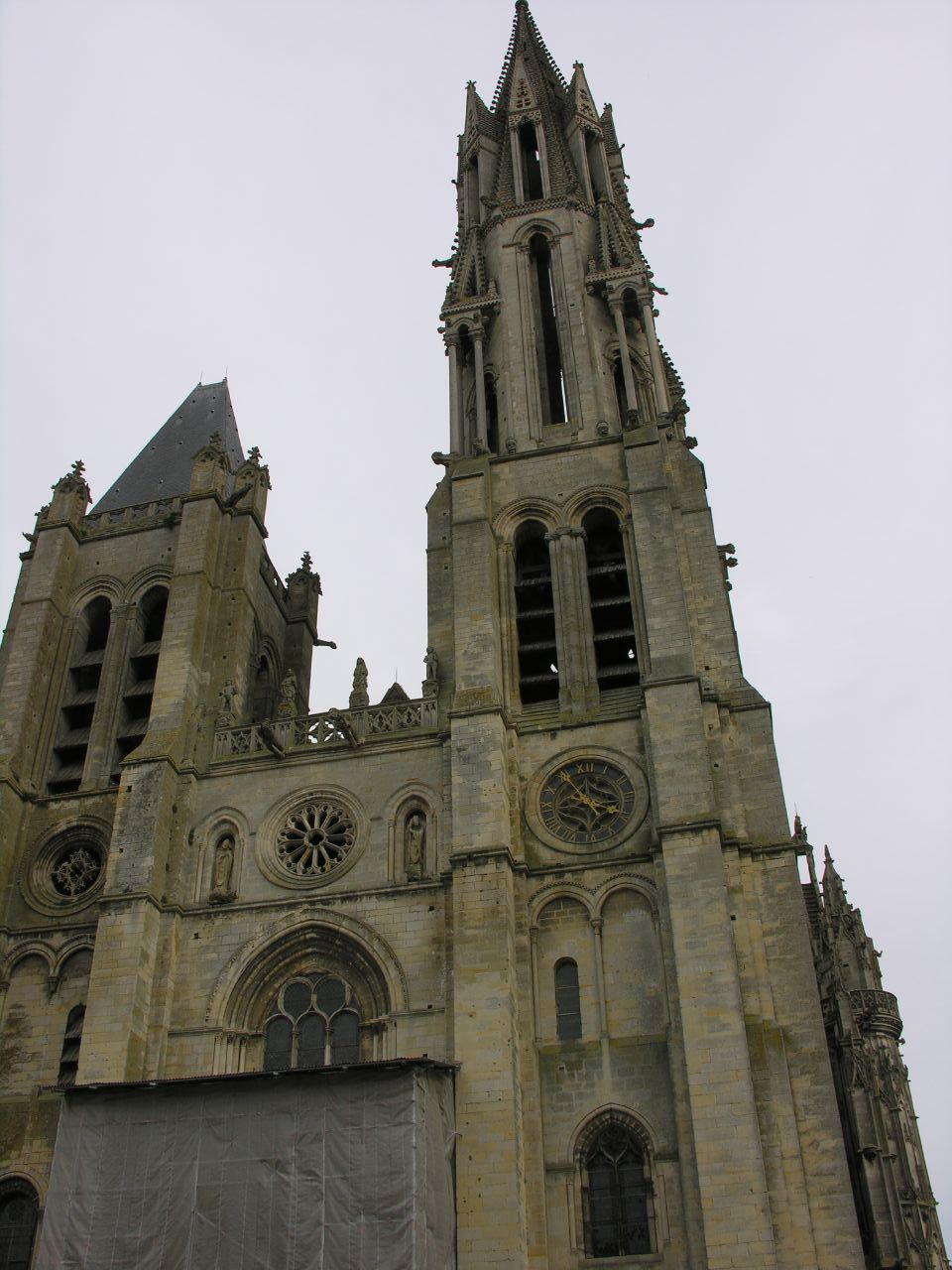 החזית המערבית.